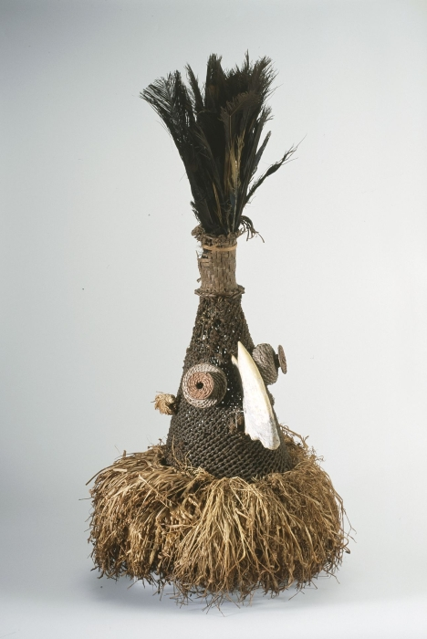 Er bestaan meerdere opinies over de herkomst en gebruik van het masker. Volgens Van Geluwe wordt het masker gebruikt in het Bwadi (Buadi) genootschap en treedt het samen met het Kubamasker op tijdens het geheime initiatieritueel en de begrafenis van geinitieerde mannen. Binkley, verbonden aan het Nelson-Atkins Museum of Art te Kansas City, heeft ter plekke onderzoek gedaan en deelde mee dat dit masker optreedt tijdens initiatie van mannen samen met een ander raffia masker genaamd Kamakengu. Het wordt gebruikt door de noordelijke Kete en zuidelijke Bushoong (zuidelijke Kuba volkeren) maar men treft het ook wel aan in Cwa (pygmee) dorpen in het oostelijk Kuba gebied. In 'African Arts', artikel van Petridis, staat een soortgelijk masker afgebeeld uit de Basel-collectie, verzameld door Hans Himmelheber. De 'munyinga' heerst over de hierarchie van maskers die een centrale rol spelen in de initatie van jongens (buadi, noordelijke Kete; nkaan, zuidelijke Bushoong).